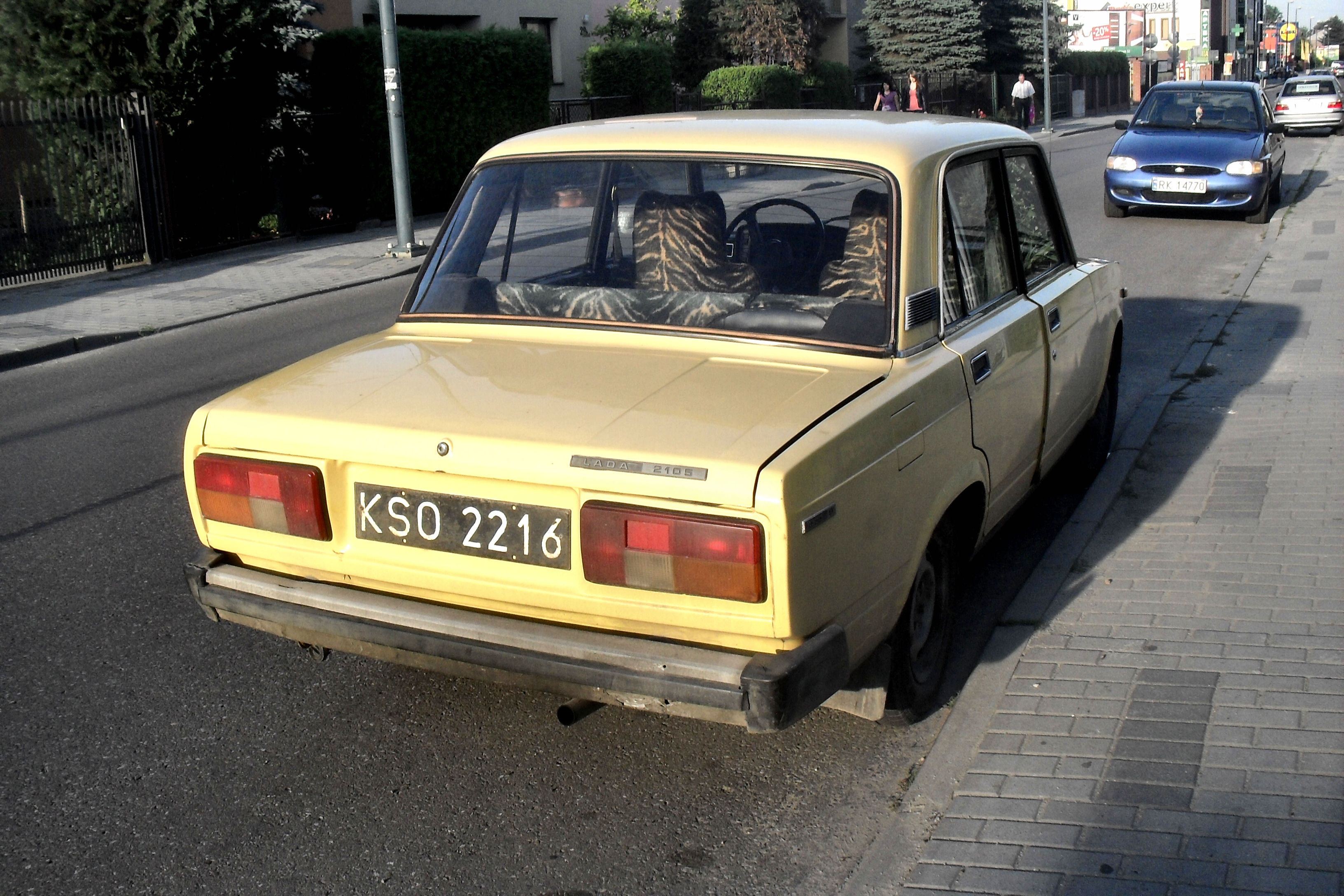 Łada-2105 w Jaśle.